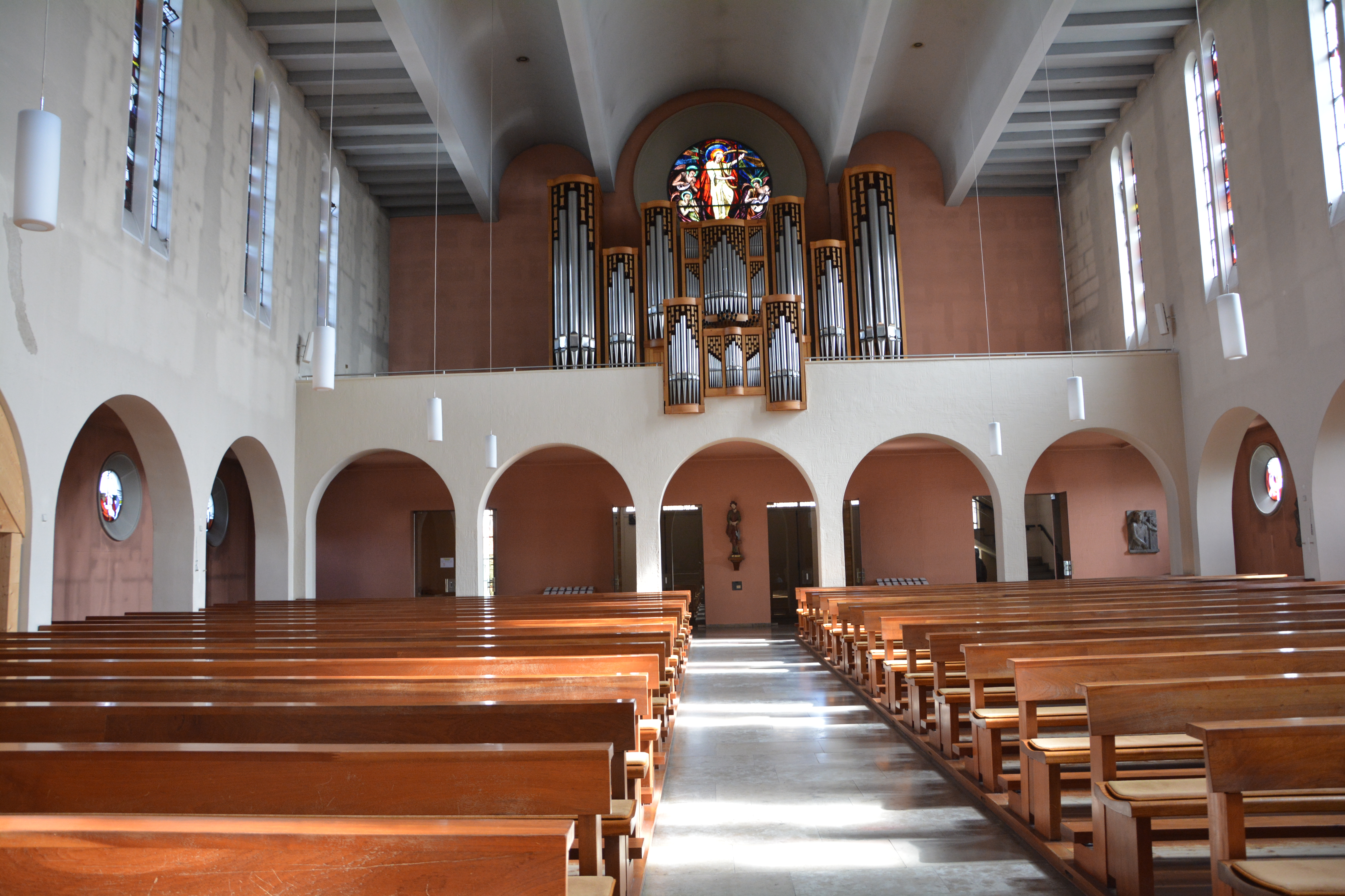 Stockach, Kirche St. Oswald